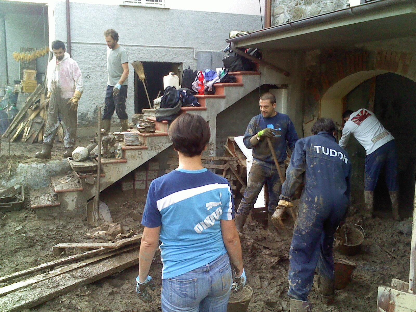 Alluvione 2011 - Borghetto: Volontari liberano una casa dal fango